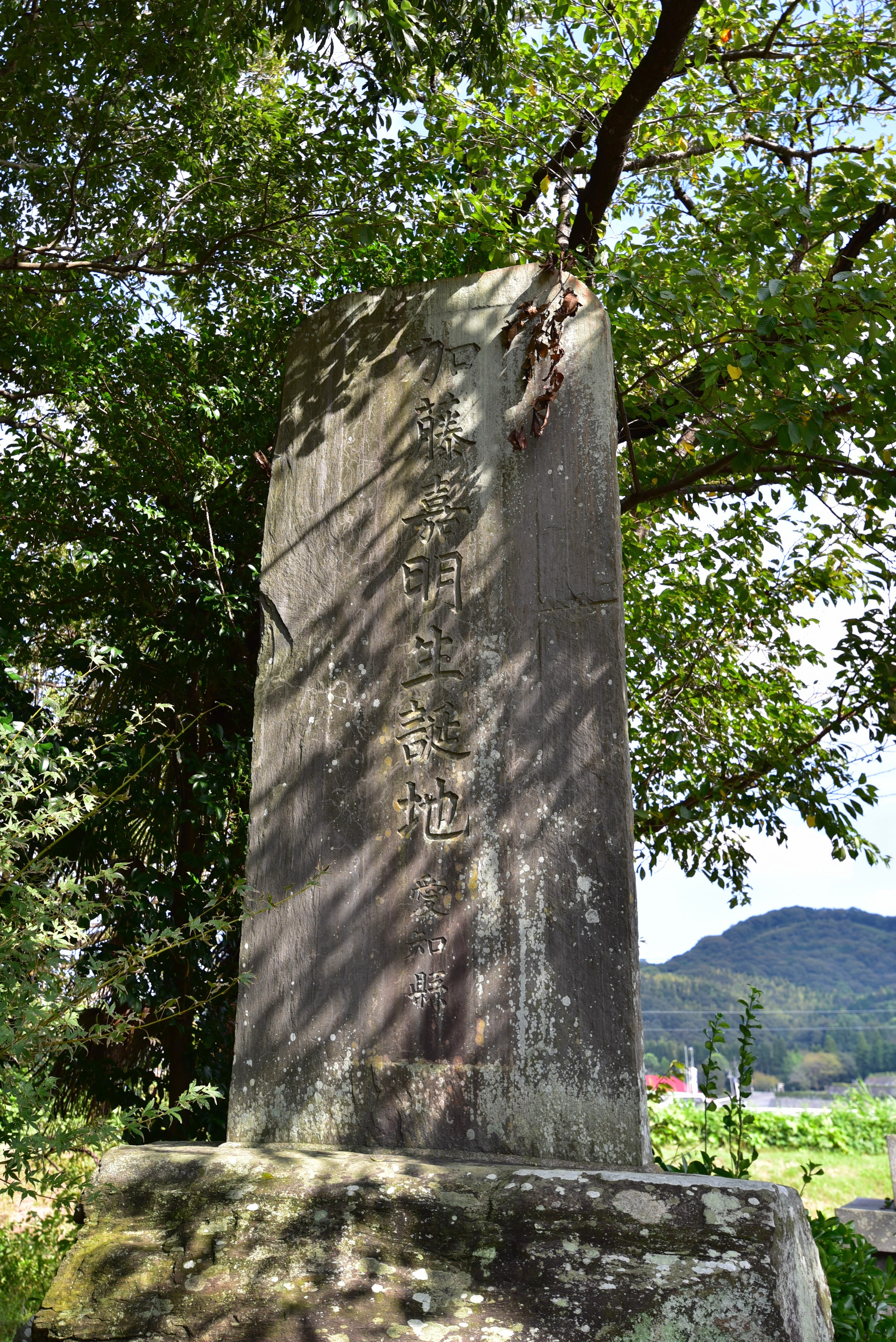 加藤嘉明生誕地碑 Nikon D750